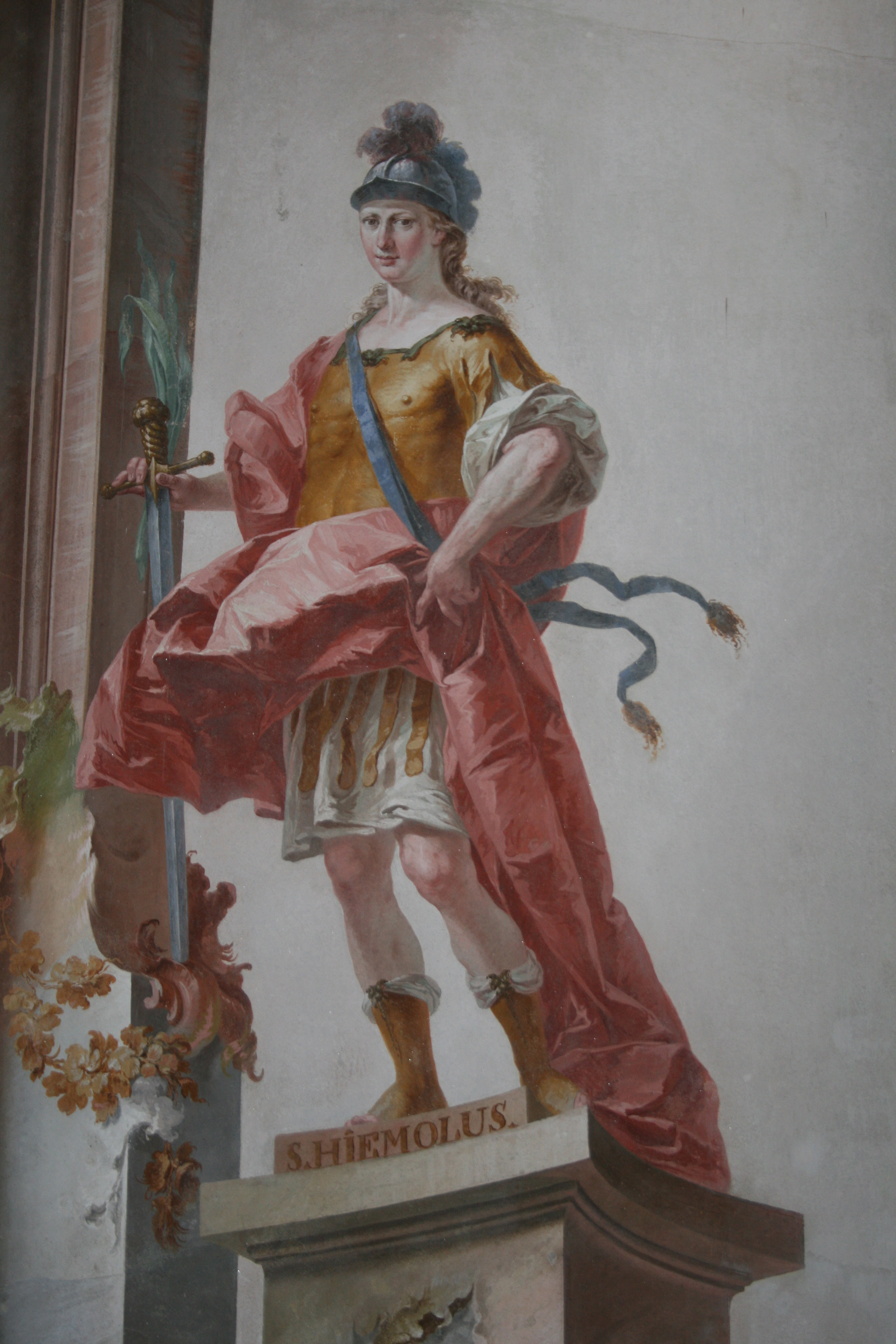 Affresco raffigurante San Jemolo, opera di Biaigo Bellotti del 1742-1745. Situato accanto sul lato destro dell'altare della chiesa di San Gregorio Magno in Camposanto a Busto Arsizio.